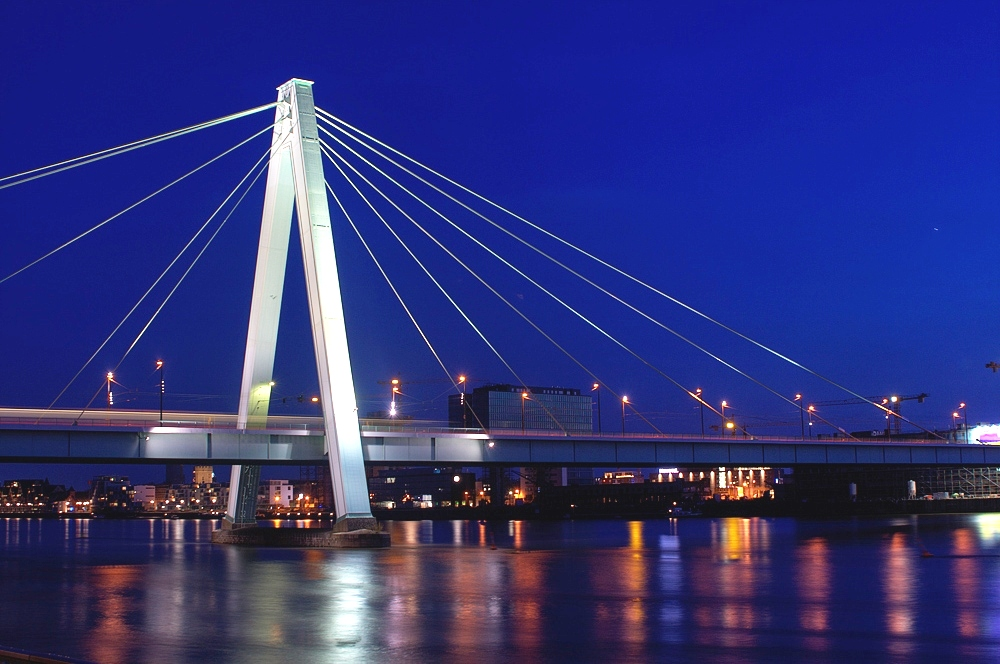 night view of Severinsbrücke, Cologne